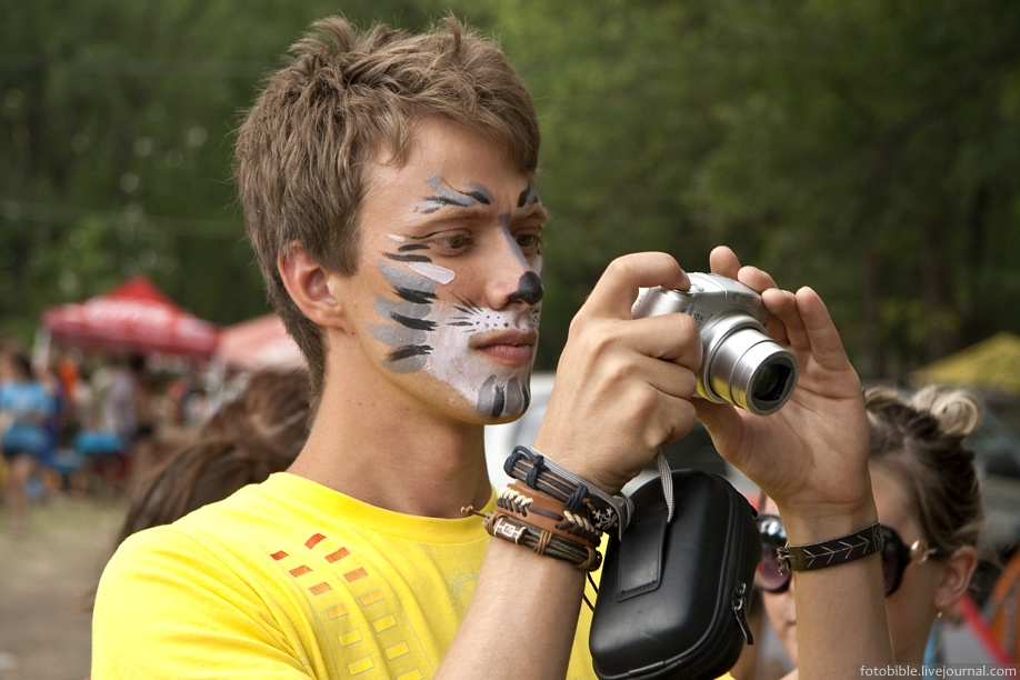 Грушинский фестиваль, Самарская область, Россия